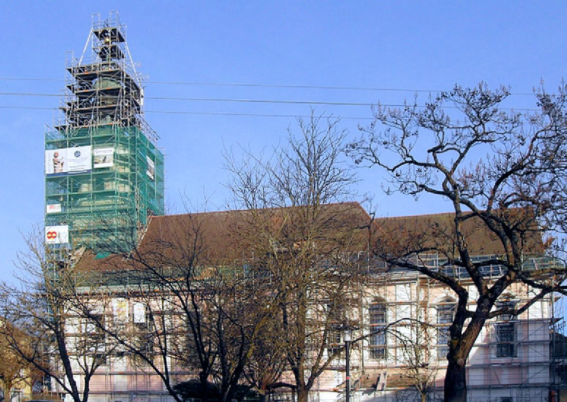 katholische Kirche St. Peter und Paul während der Rekonstruktion Ende 2014 in Hilzingen, Deutschland